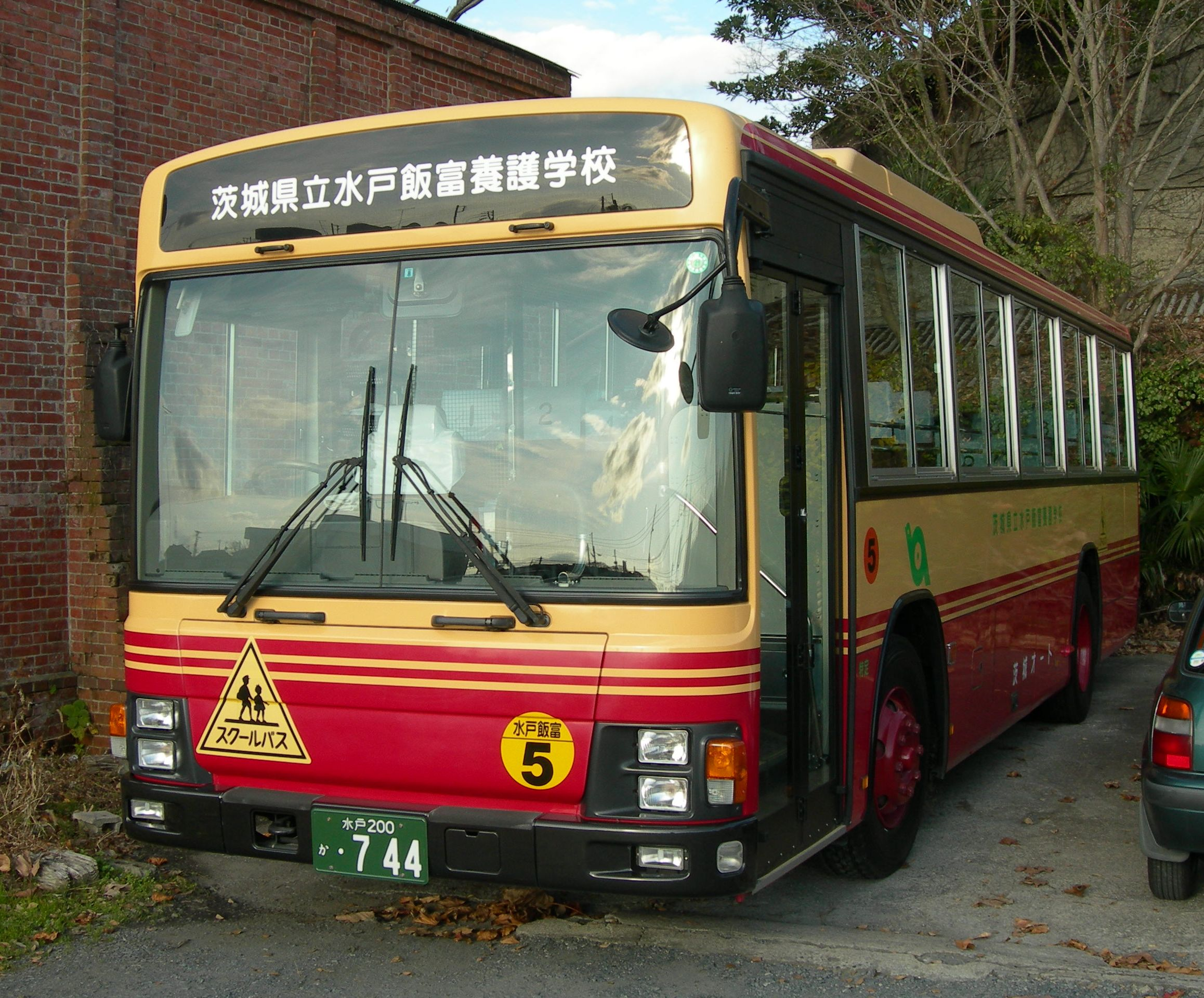 茨城オート 養護学校送迎の特定車両